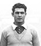 Paul Sinibaldi en 1948 (Stade de Reims).